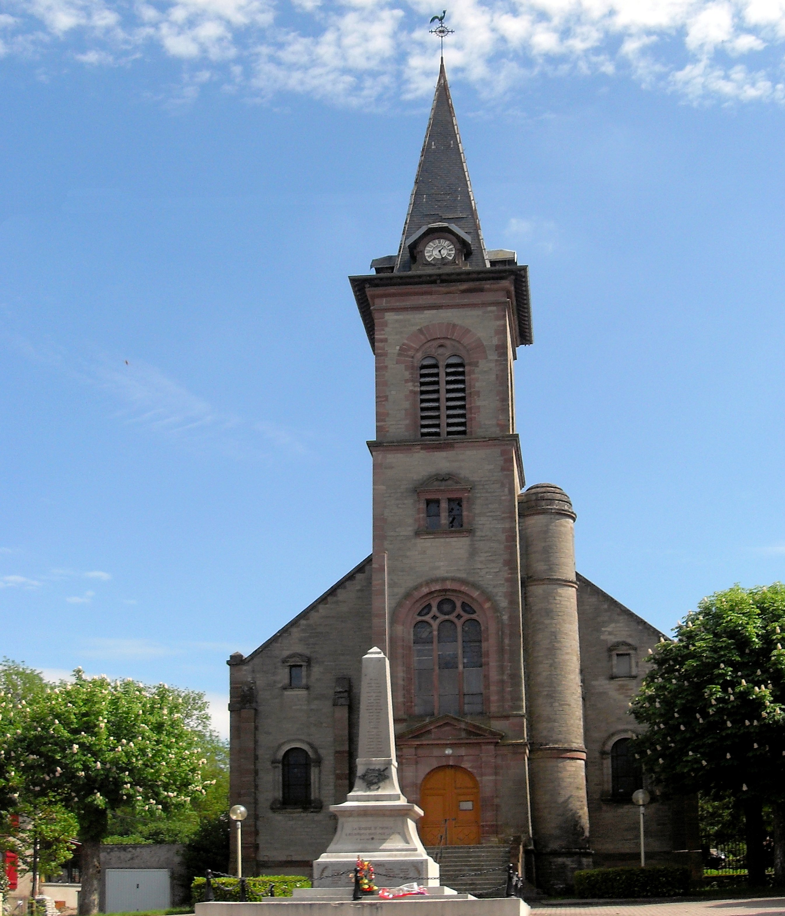 L'église Saint-Laurent de La Verrière, commune de Portieux, côté nord